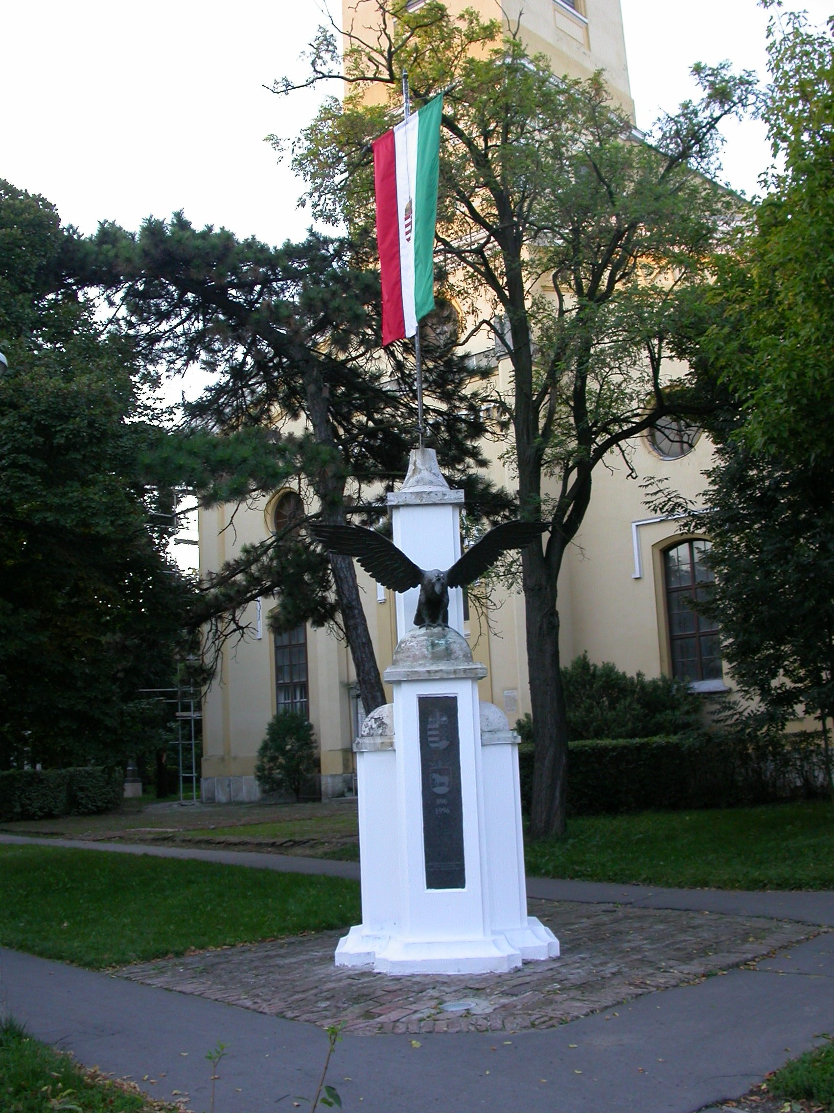 Országzászló a turul szoborral Karcagon, a főtér (Kossuth tér) református templom (háttérben) által határolt sarkán.